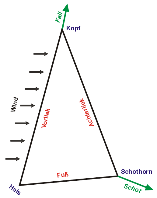 Benennung der Teile des Segels